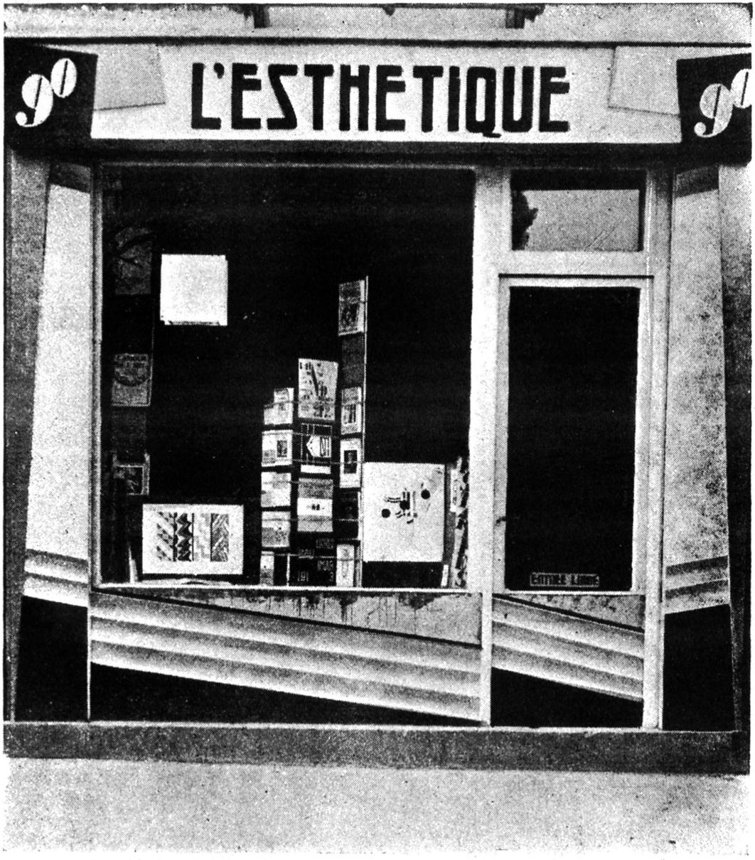 Anoniem. Boekwinkel L'Esthétique, Boulevard du Montparnasse 90, Parijs. Ca. 1926. Foto. Afkomstig uit De Stijl, 7e jaargang, nr. 73/74 (1926): p. 32.